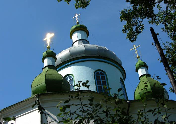 Фрагмент_Миколаївської_церкви_в_Олевську.jpg: Свято-Миколаївська церква (фрагмент) у центрі міста Олевська (райцентр Житомирської області), серпень 2005 року